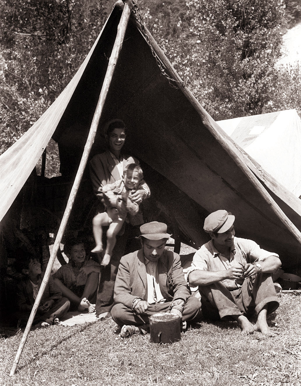 Cigani.